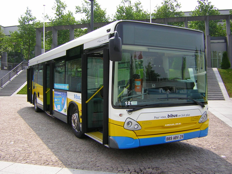 Ce Heuliez GX 327 est l'un des premiers à avoir été mis en service commercial en France. Il a été photographié à Brest sur la place de la Liberté lors de sa présentation officielle aux élus. Photo : Pierre-Yves LEGENDRE